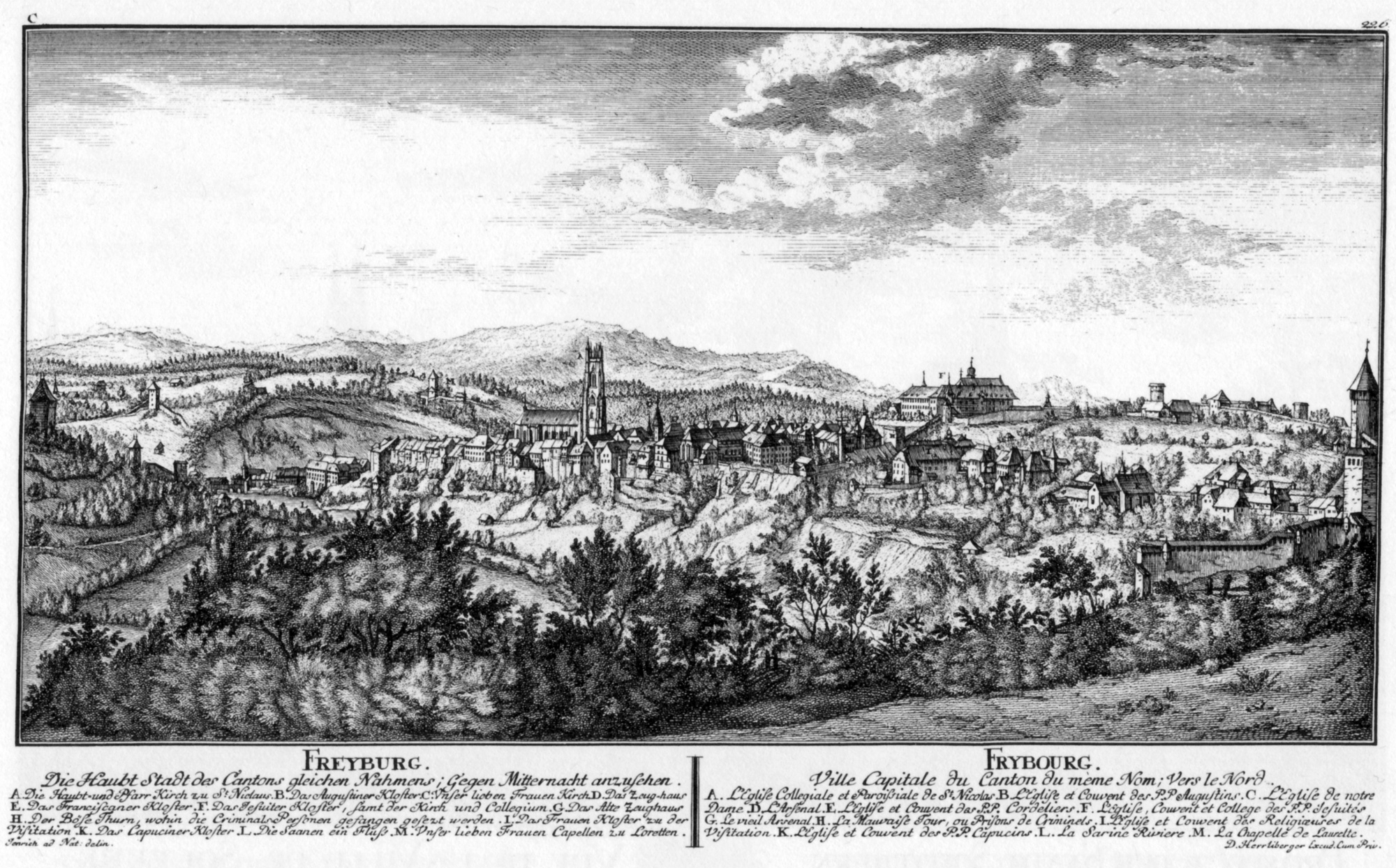 Ansicht der Stadt Freiburg i. Ü. ca. 1780. Blatt 226 in der Topographie der Eidgenossenschaft, zweite Lieferung 1785–1762/63. Stich von David Herrliberger nach einer Zeichnung von Theodor Andreas Jendrich, ohne Jahr